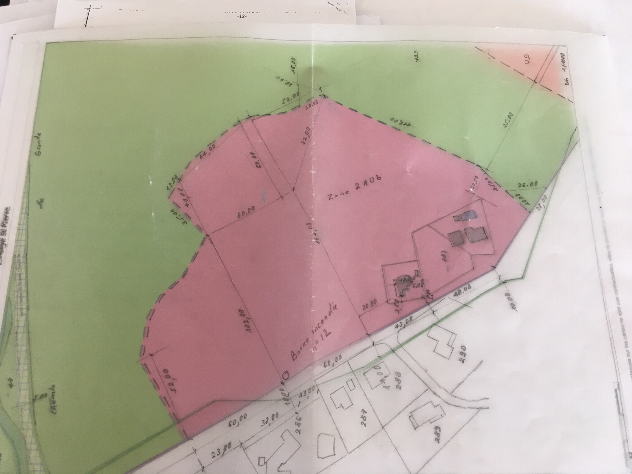 Ampus. Extrait zone 2AUb du PLU Ampus avec cotes approximatives